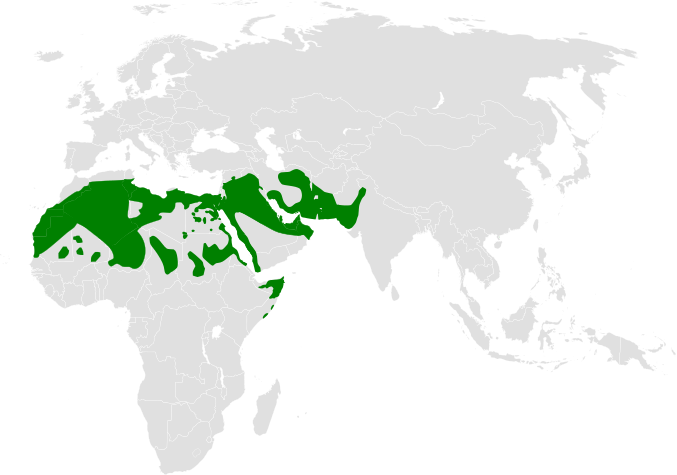 Alaemon distribution map